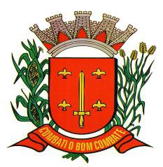 Brasão de General Salgado, SP